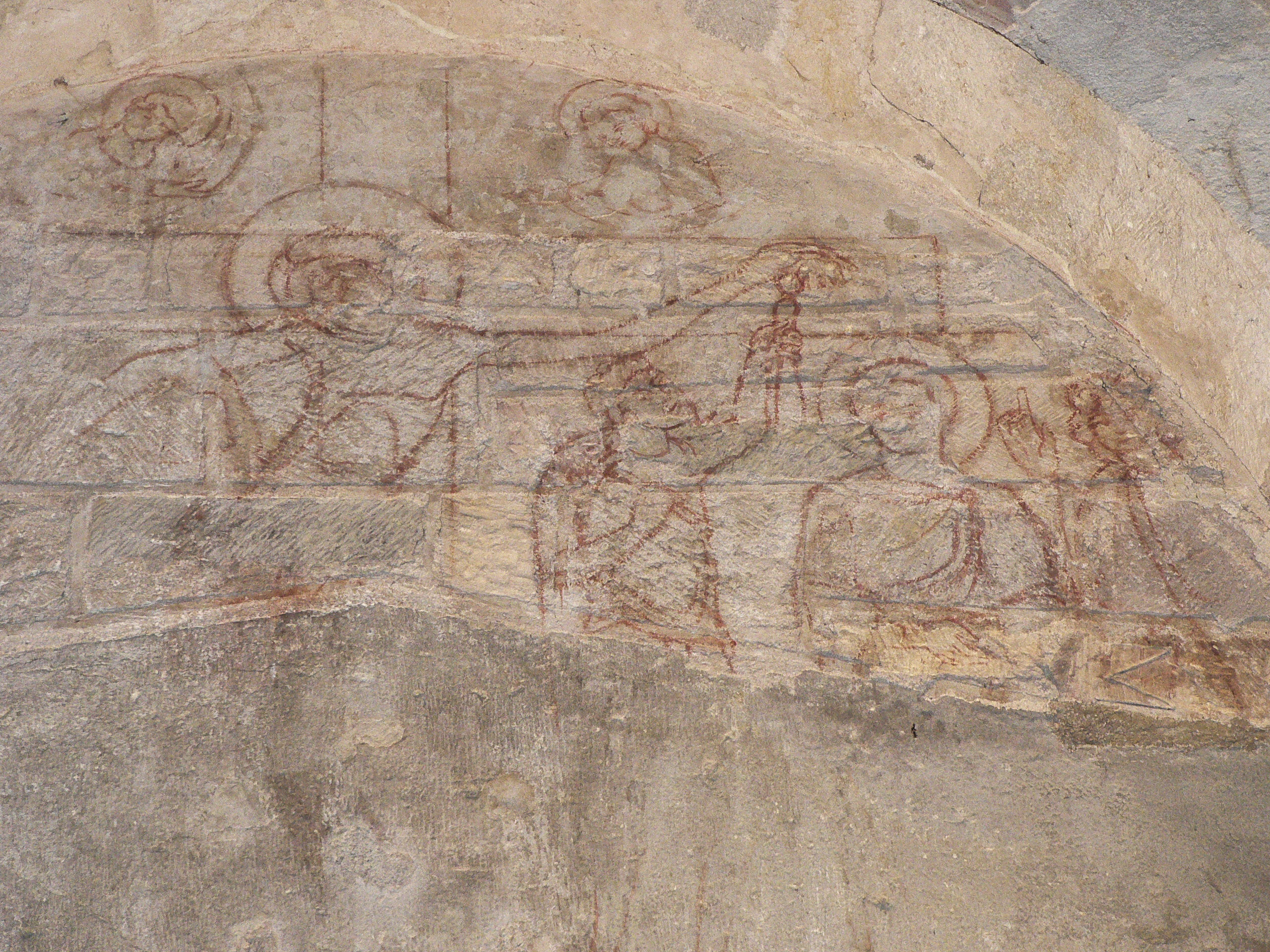 Ébauche de fresque (sanguine) dans le porche Nord de l'église Saint-Pierre de Mozac (63 - France). Elle représente une "descente de croix".